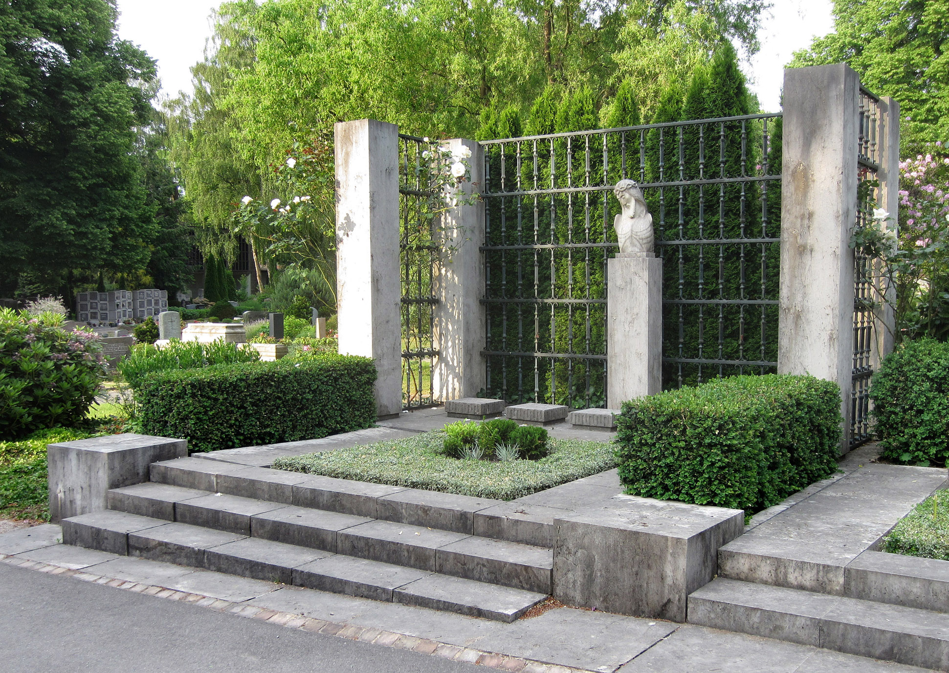 Grabmal der Familie Albano Müller auf dem evangelischen Friedhof Oehde in Schwelm. Gestaltet von Bildhauer Arno Breker (ohne Jesus-Büste), errichtet im November 1950. Die Jesus-Büste ist von einem unbekannten französischen Künstler. Das Grabmal beinhaltet die Einzelgräber von Albano Müller (1866-1946), Helene Müller geb. Kleine (1869-1947), Albano Albano-Müller (1897-1964), Ruth Albano-Müller geb. Heine (1902-1978) und Eleonore Vits geb. Müller (1903-2001). Eine seitliche Erweiterung des Grabmals (rechts im Bild) ist von 2011.